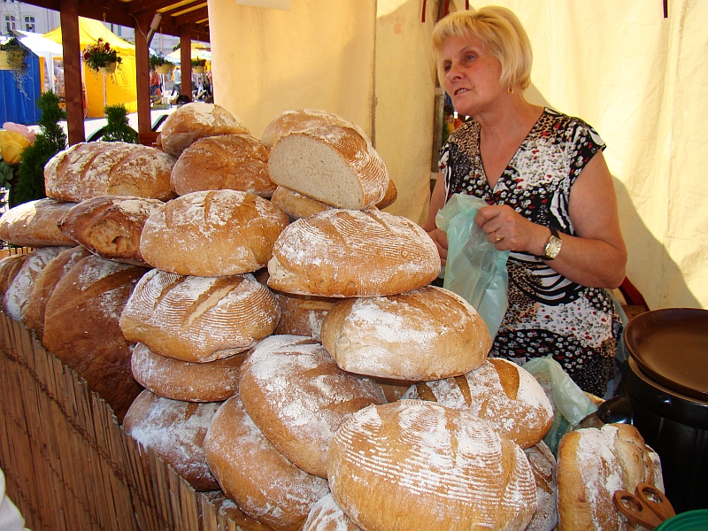 Die Ikonen der zeitgenössischen Volkskunst in Sanok.